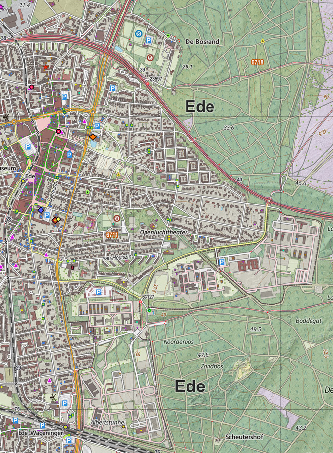 Topografische kaart van Ede (woonplaats). Resolutie: 300 pixels/km. Kaartbeeld samengesteld uit de open geodata van de Top10NL en Top25namen (Basisregistratie Topografie, Kadaster), Creative Commons BY licentie. Gebouwvlakken uit open geodata BAG extract. Wegen uit de OpenStreetMap, OpenStreetMap community. Reliëfschaduw uit de Actuele Hoogtekaart AHN2. Samenstelling en kleurenschema: Jan-Willem van Aalst, met QGIS2. Zie ook de Legenda.